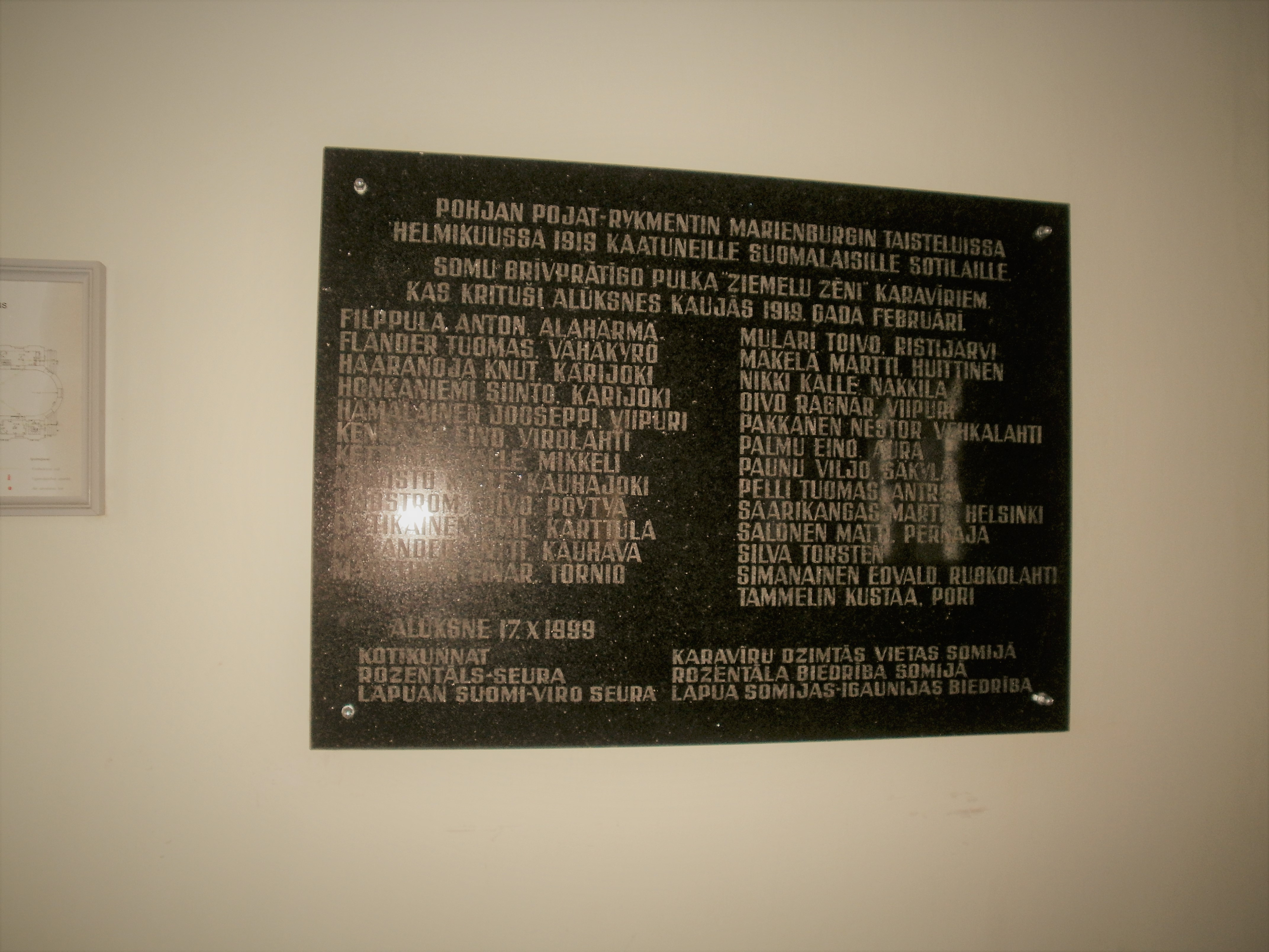 Mälestusplaat kirikus Soome sõduritele Põhja poegade rügemendist, kes vabastasid Aluliina bolševikest 1919 a. veebruaris.